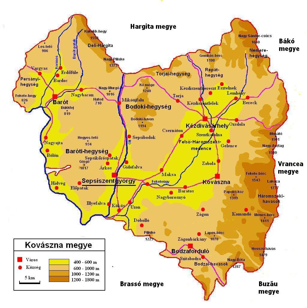 Kovászna megye domborzati térképe fontosabb településekkel, hegységekkel, folyókkal és utakkal.